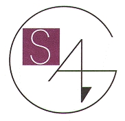 Logo Sdružení Ackermann-Gemeinde